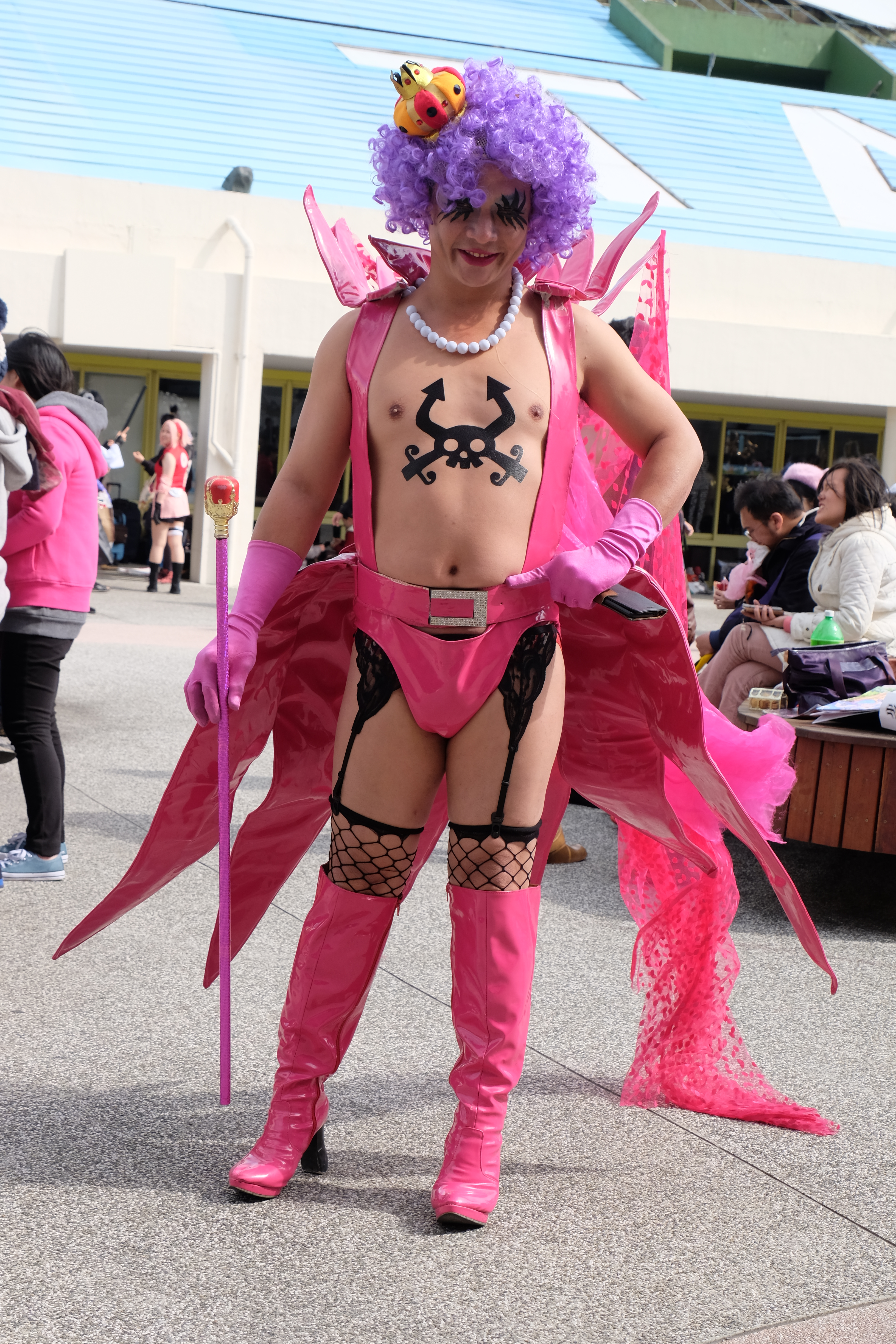 FF25第二日下午，＜One Piece＞人妖王Cosplayer。